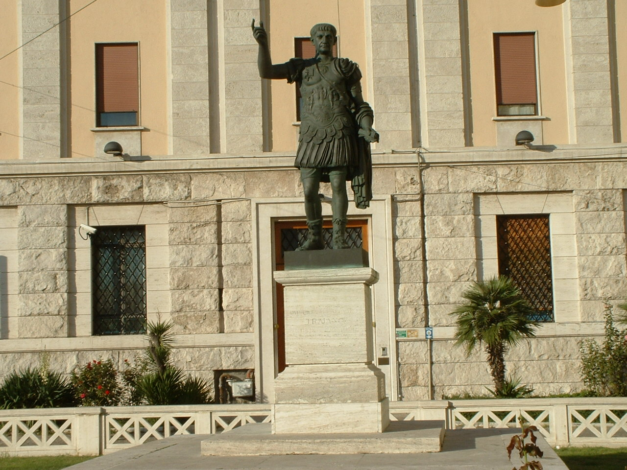 Ancona, statua moderna in bronzo dell'imperatore romano Traiano.